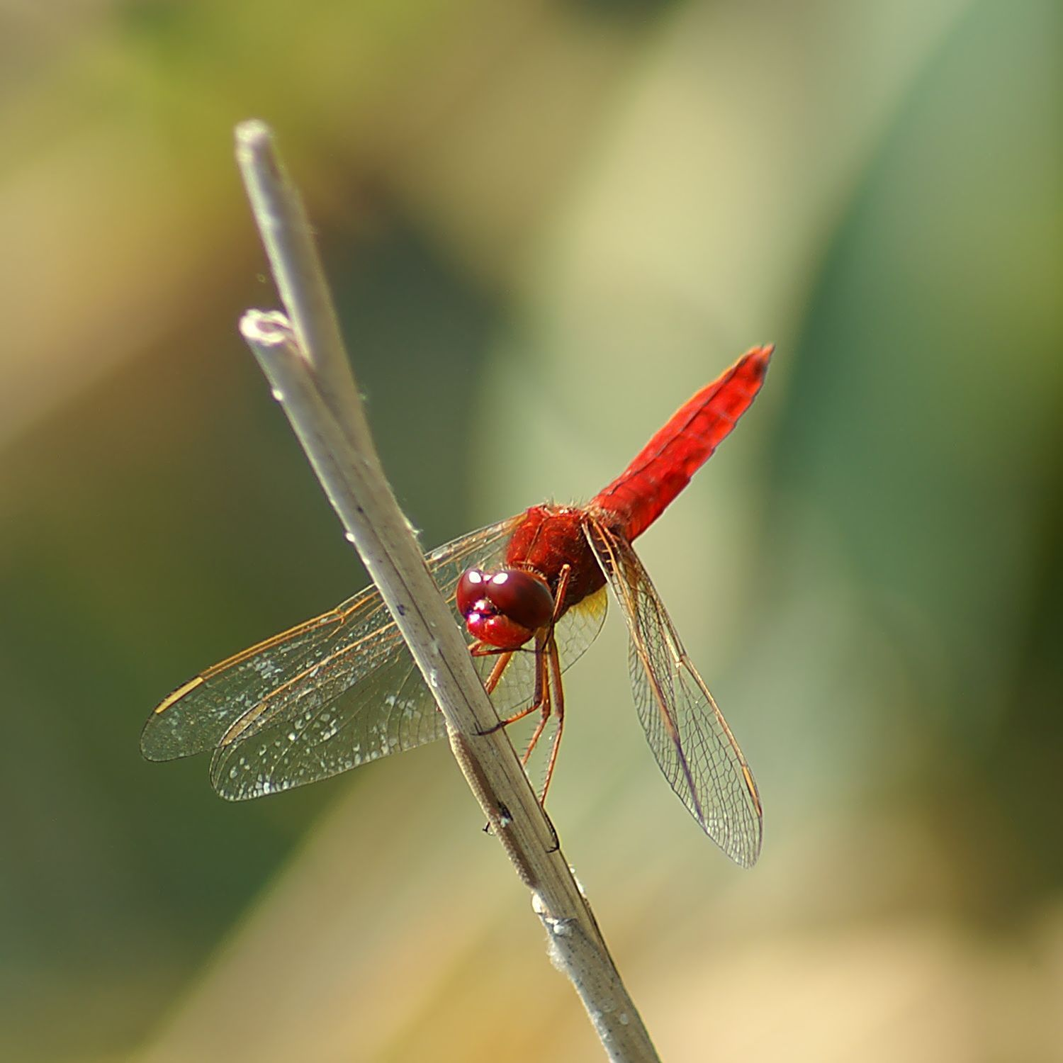 Feuerlibelle, gesehen in Kreta